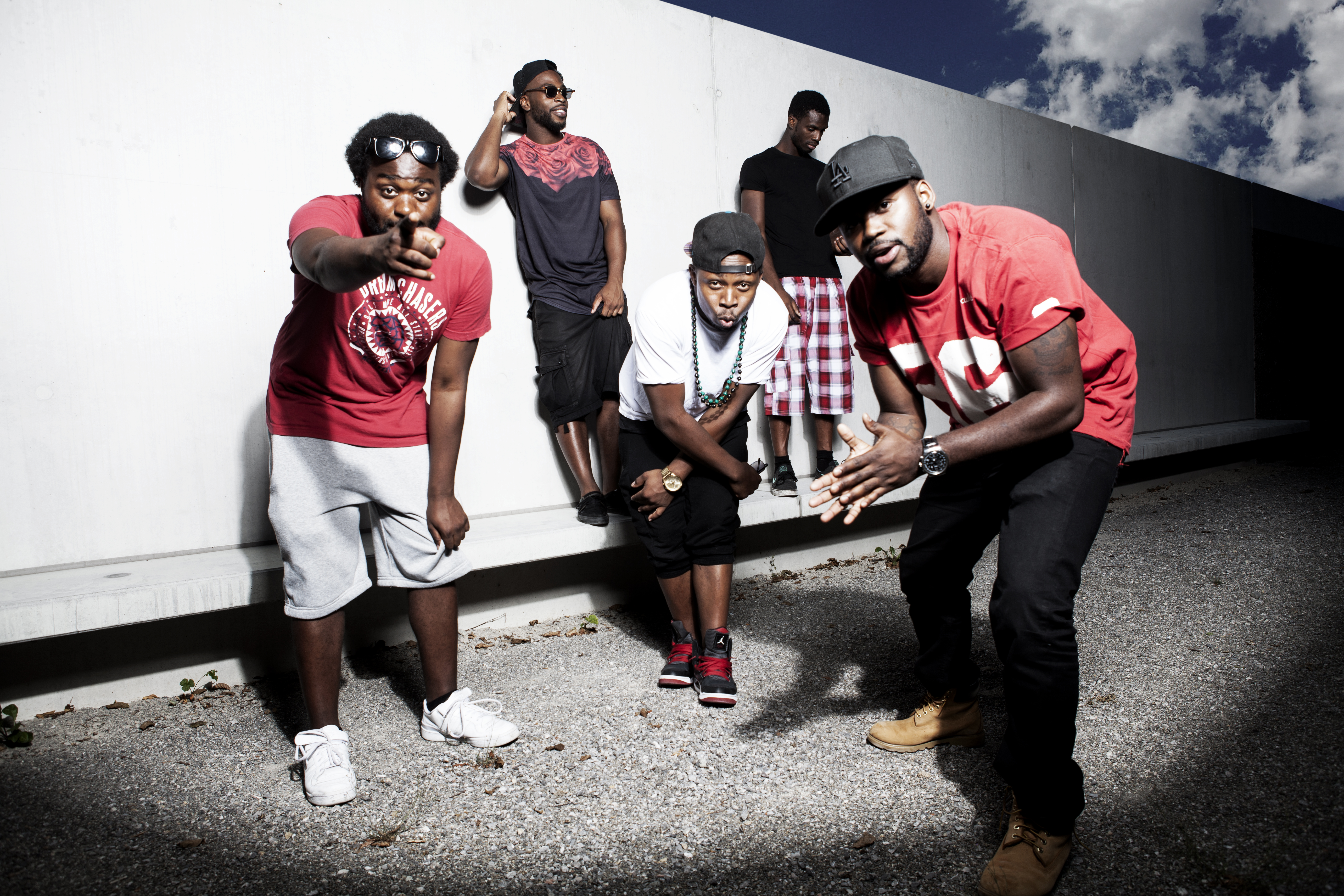 New Jack Gruppe Fotografiert von; Sabrina Bühlmann